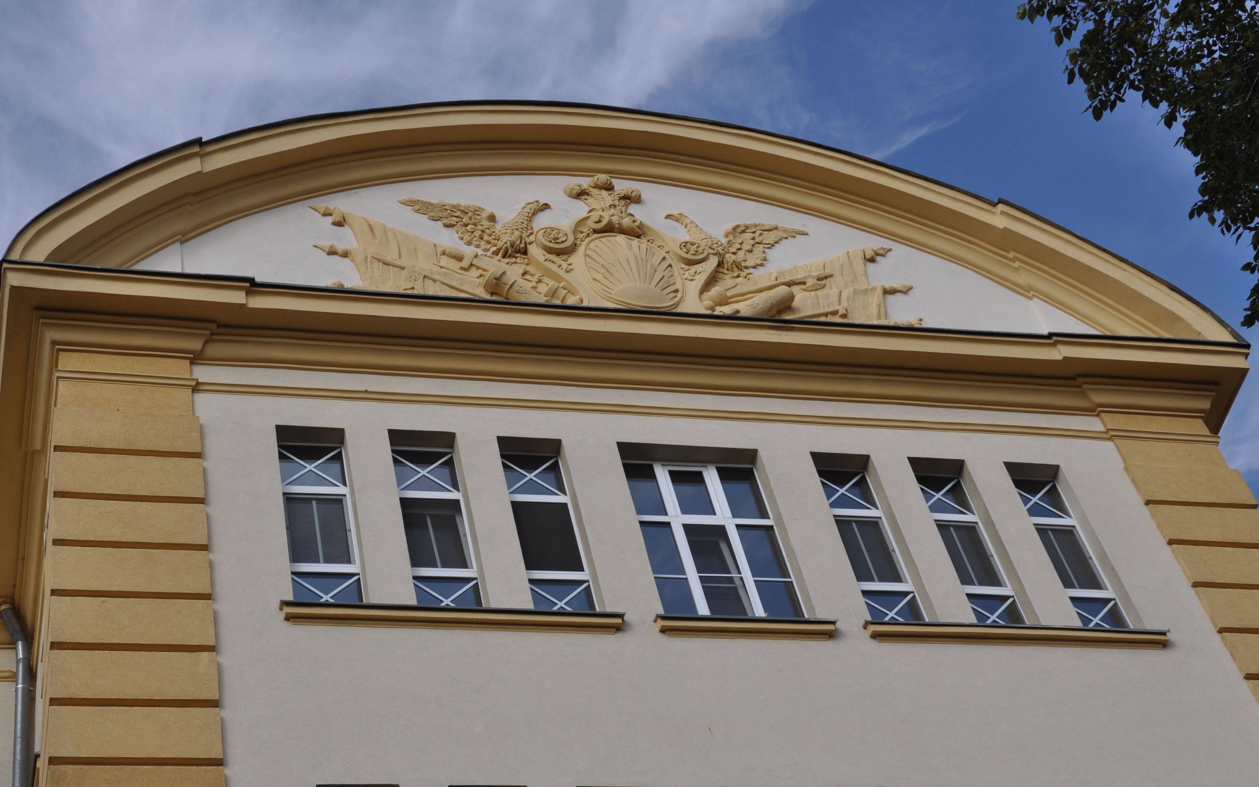 rawicz motyw nad wejsciem do do ówczesnej komendy Korpusu Kadetów. 2010 wejście do szpitala powiatowego